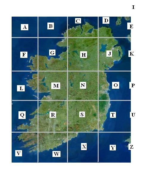 La Grille approximative de l'OSI fait par moi même pour GPL Gavigan 2007